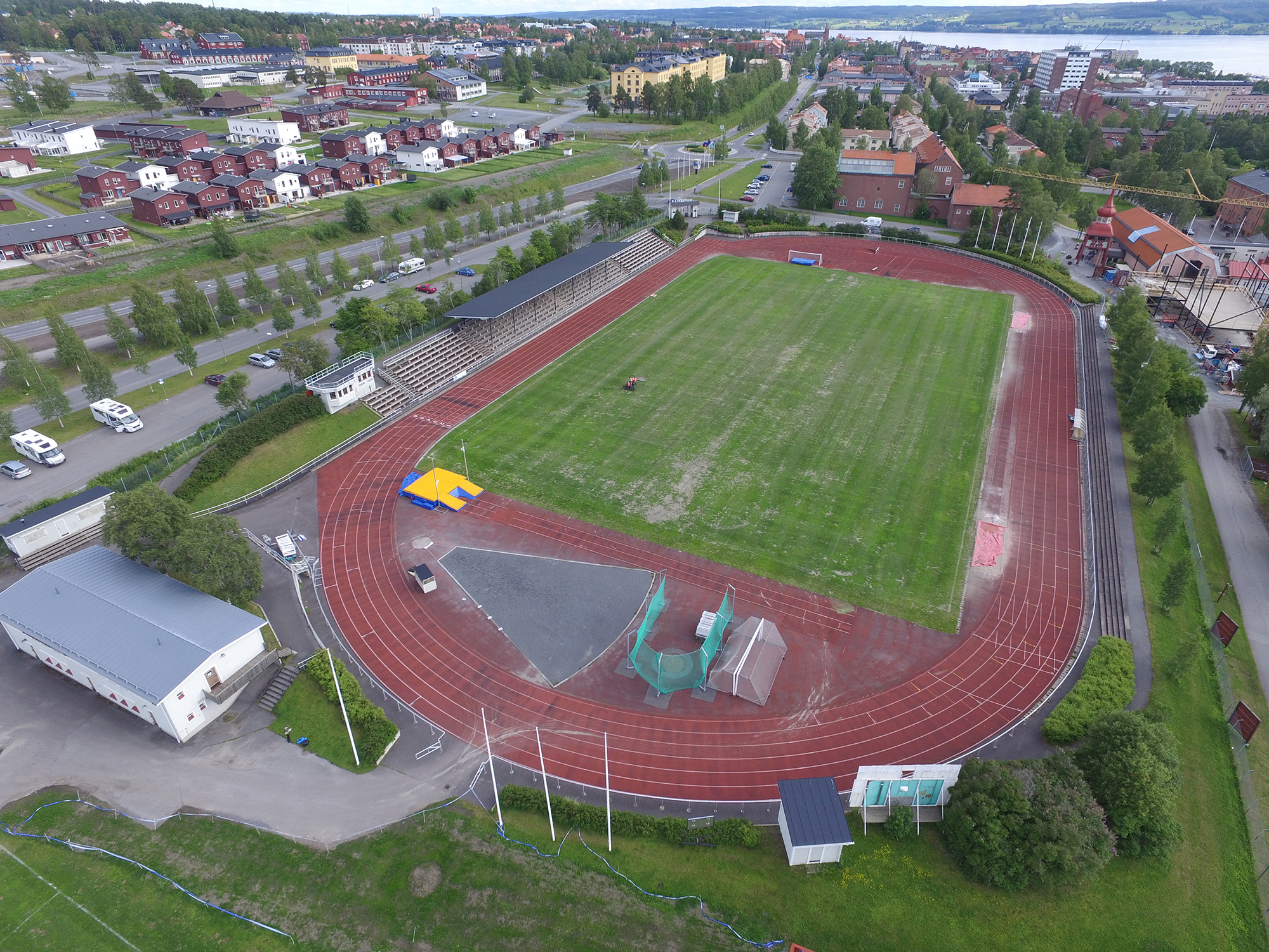 Hofvallen Östersund Sommaren 2017